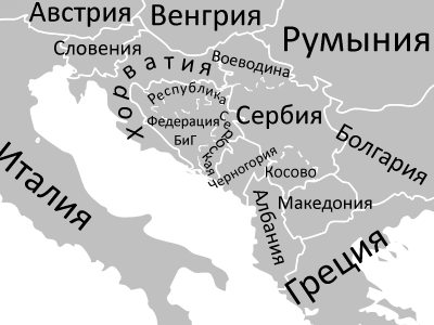 Западные балканы и прилежащие страны, включая регионы Сербии и Боснии и Герцеговины